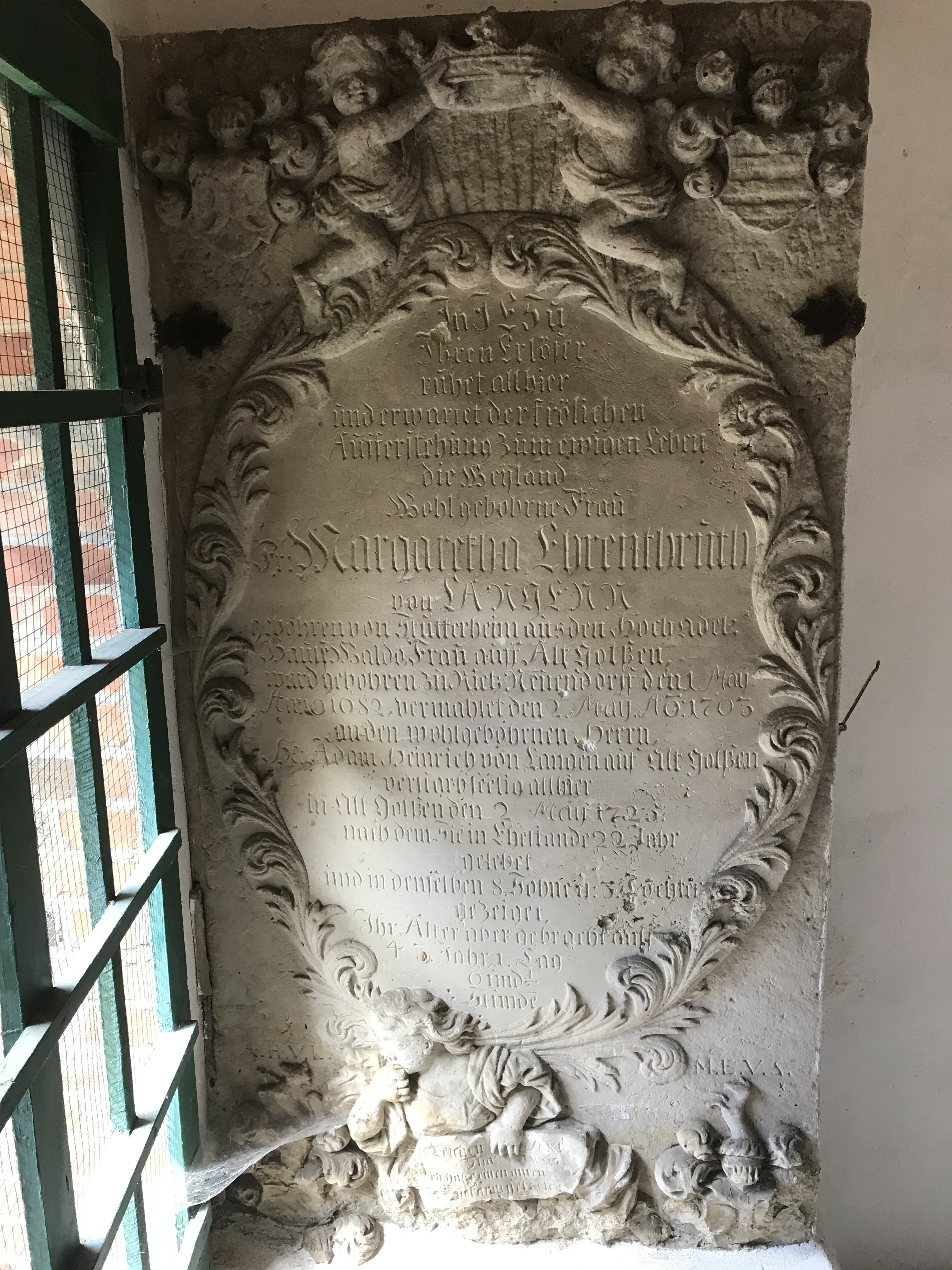 Die Dorfkirche in Altgolßen entstand Anfang des 14. Jahrhunderts und wurde in den Jahren 1899 bis 1902 erheblich umgebaut. Auf dem angrenzenden Friedhof befinden sich bedeutende Gräbdenkmäler aus den Patronatsfamilien des 18. und 19. Jahrhunderts.